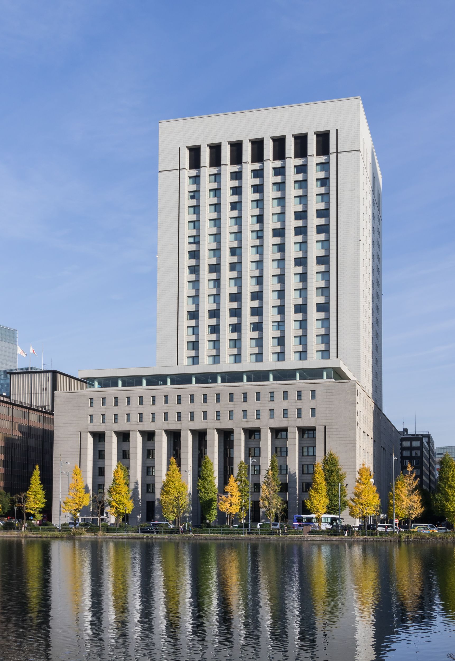 第一生命本社